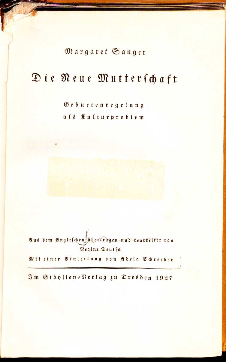 Margaret Sanger Die neue Mutterschaft 1927 Titel